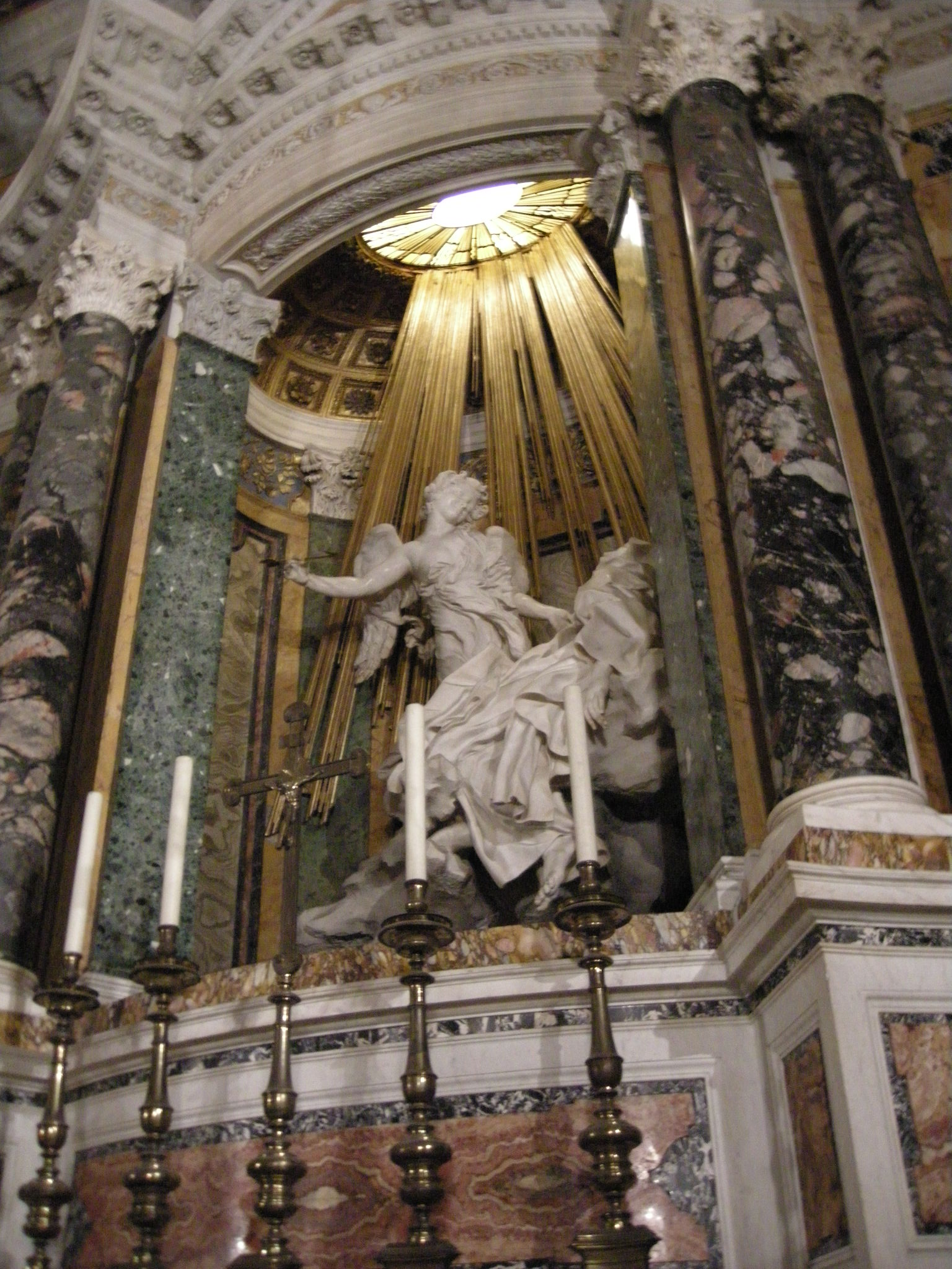 Santa teresa di bernini